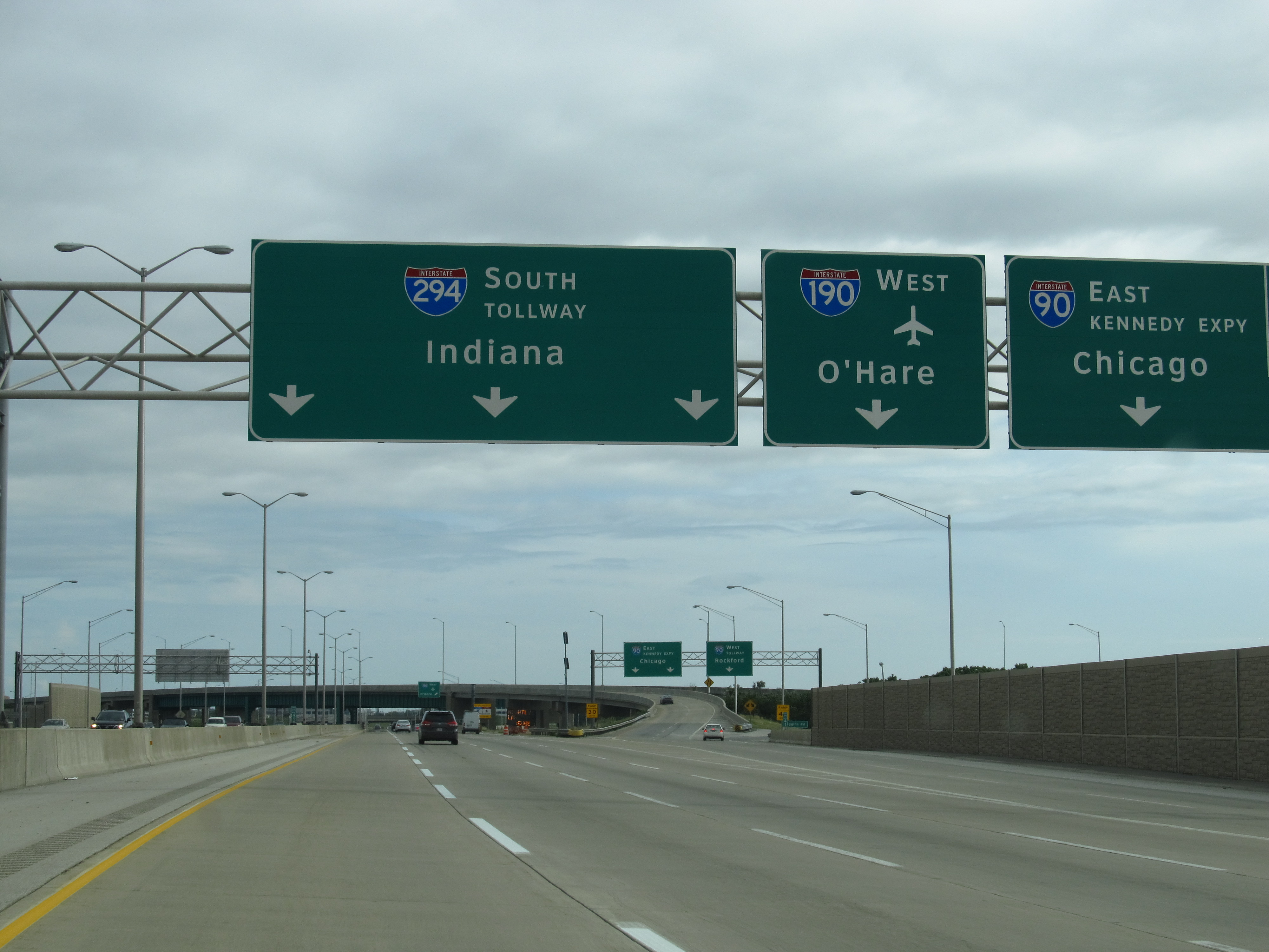 Rodovia estadual I-294, próximo a Chicago, IL